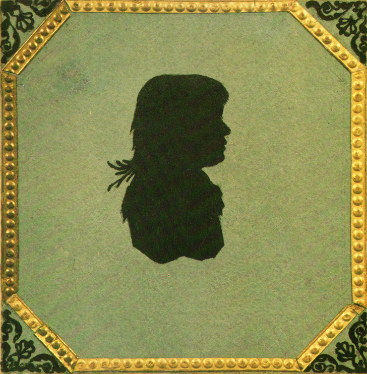 Volkonskaya Maria Nikolaevna